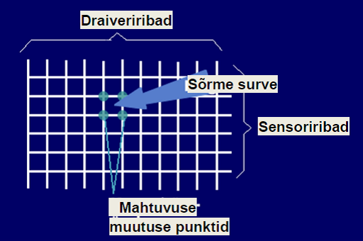 Enda tehtud